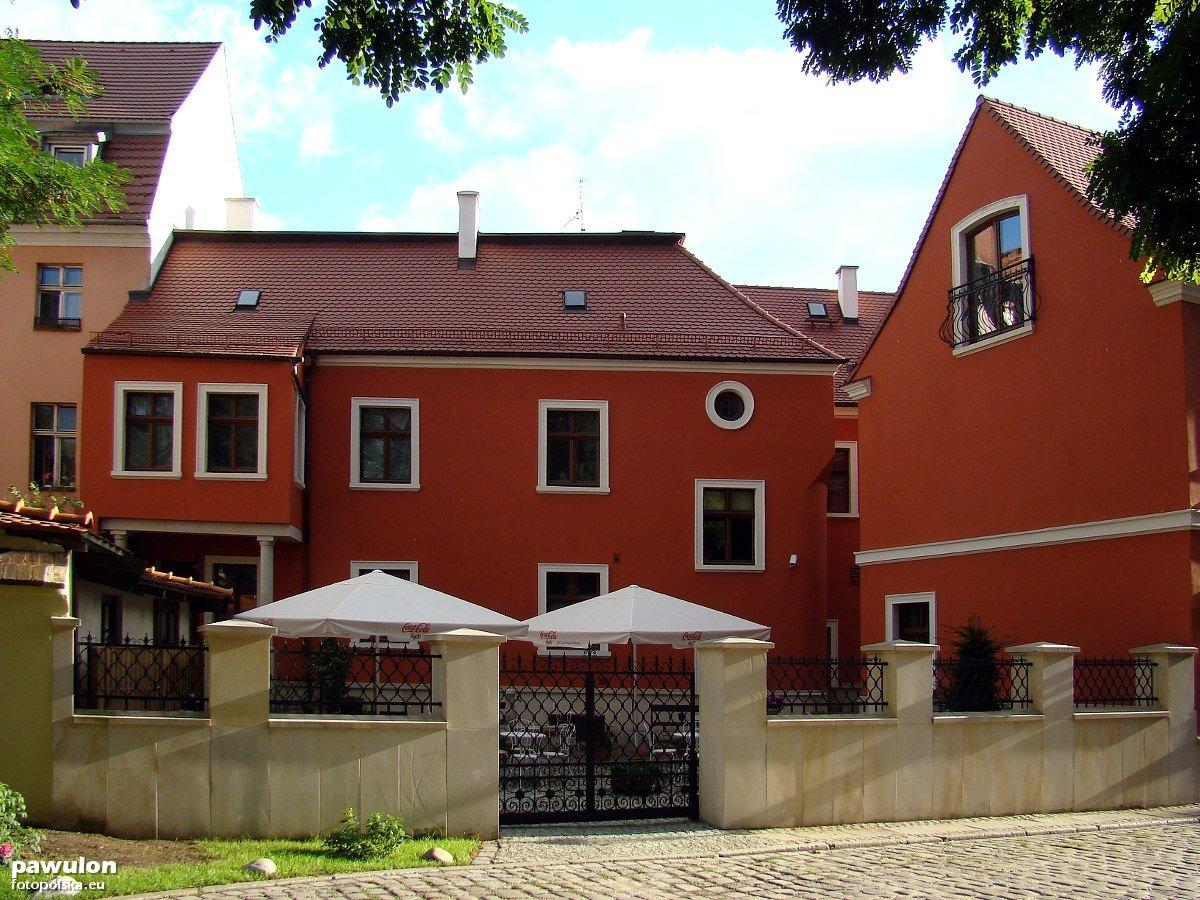 Kamienica nr 1 przy pl. Kościelnym.